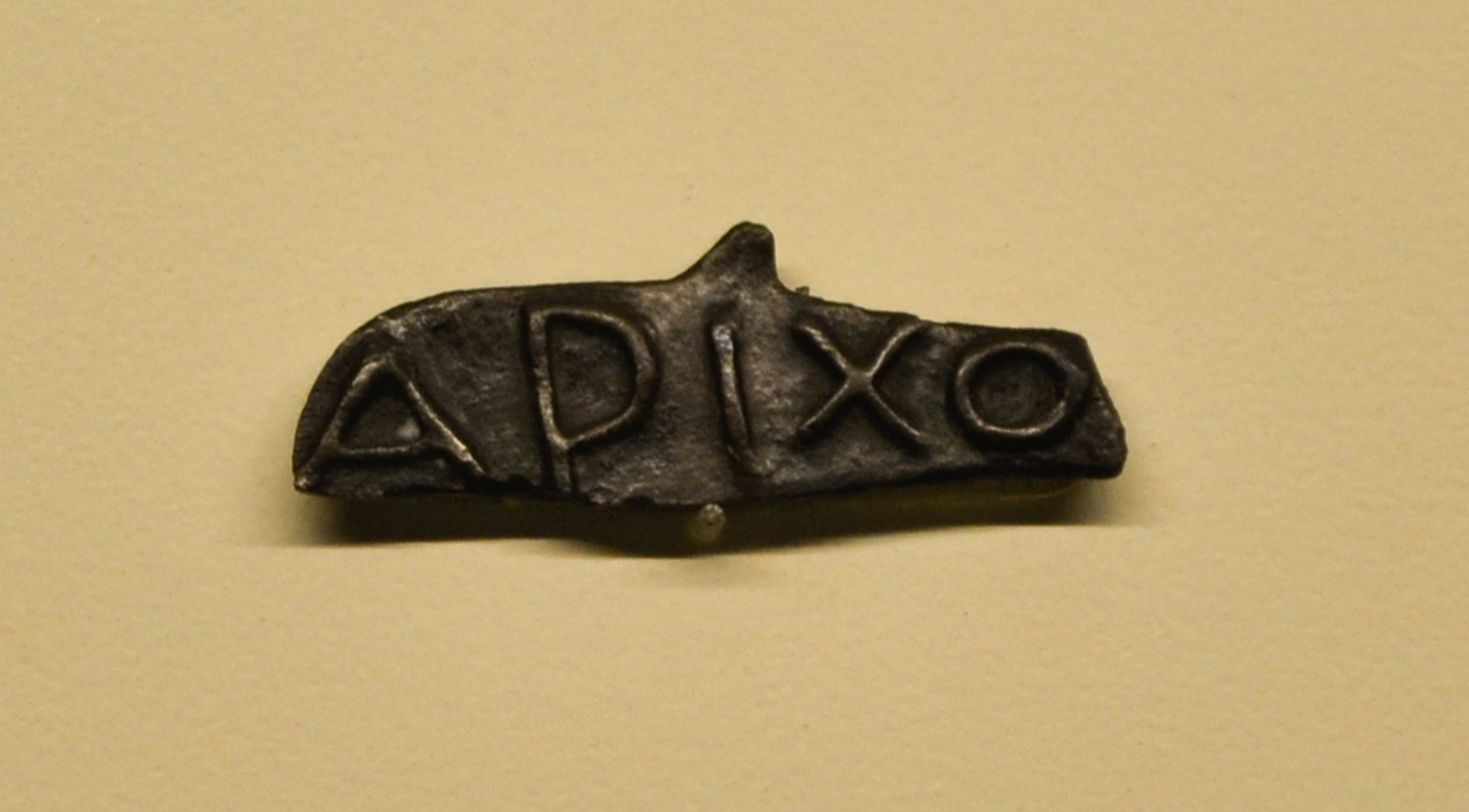 Moneda en forma de delfín. Olbia (M.A.N.)